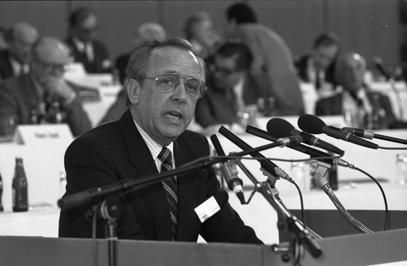 SPD-Parteitag in der Olympiahalle in München